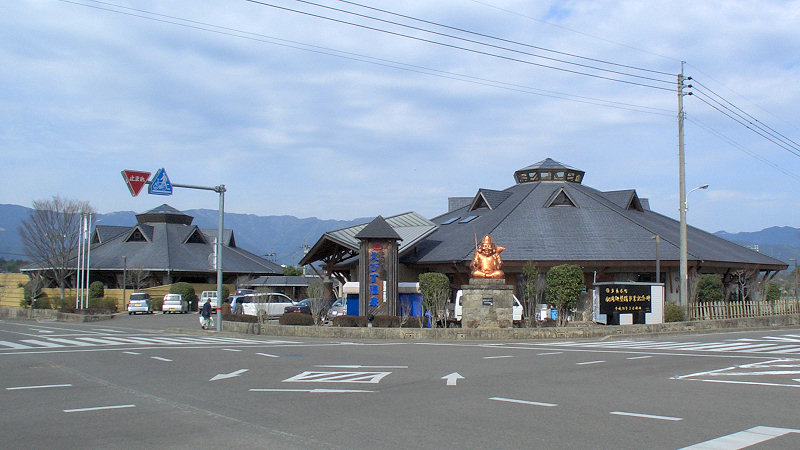 多良木町えびす温泉センター 外観 撮影者/著者/著作権保有者 : MK Products (本人がアップロード) 撮影日 : 2007/03/14 多良木駅用にアップロードした画像です。良い画像があれば別の画像に変えてください。 Category:多良木町の画像